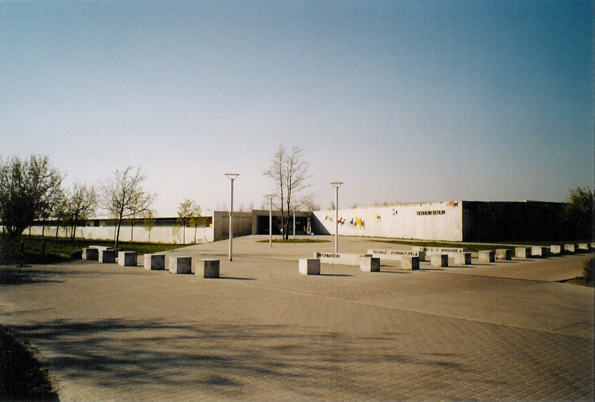 Falkenberg, Haupteingang Tierheim Berlin am Nachmittag.